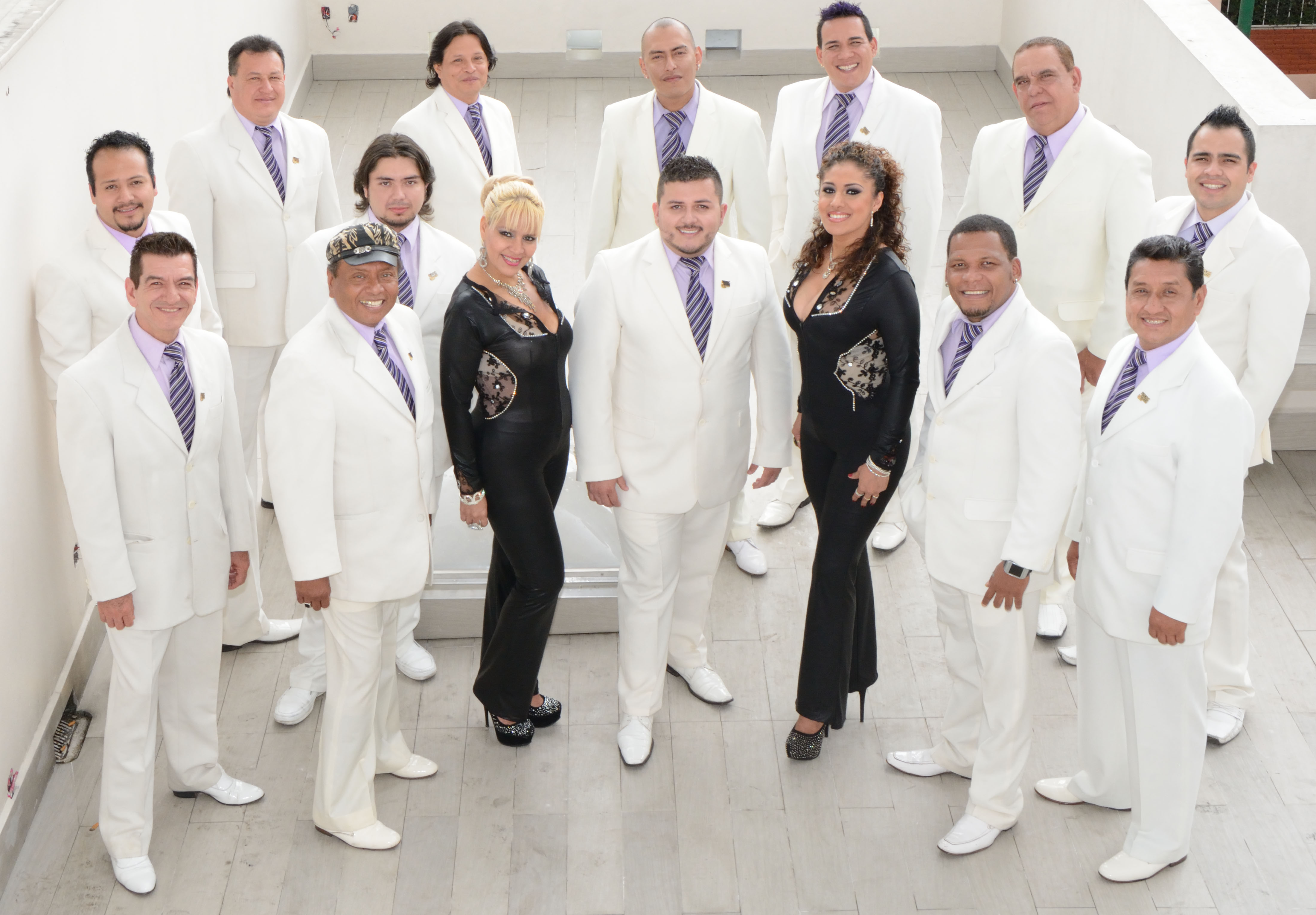 Grupo Musical Colombiano de Cumbia Colombiana, actualmente radicado en la Ciudad de Mexico. Creadores de éxitos como: La Cadenita, El Cucu, Mil Horas, Escándalo, Que nadie sepa mi sufrir, El viejo del sombreron, entre otros.